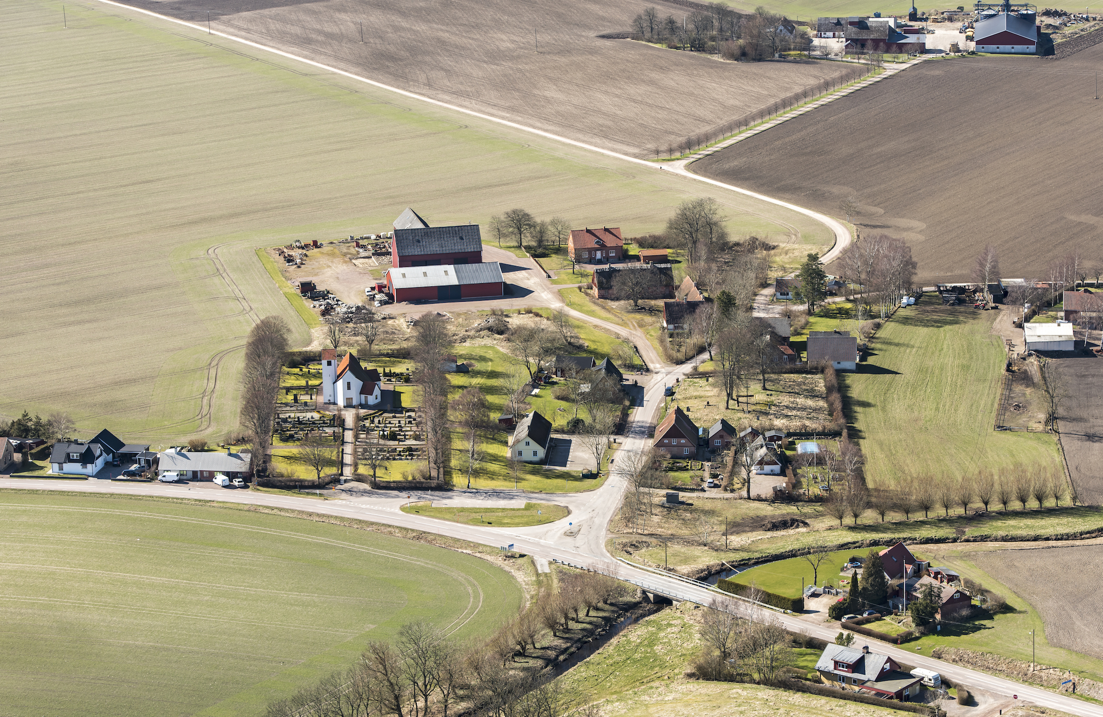 Källs-Nöbbelövs kyrka, kyrkomiljö. Länsväg 106 passerar öster om kyrkan i bildens nedre halva.